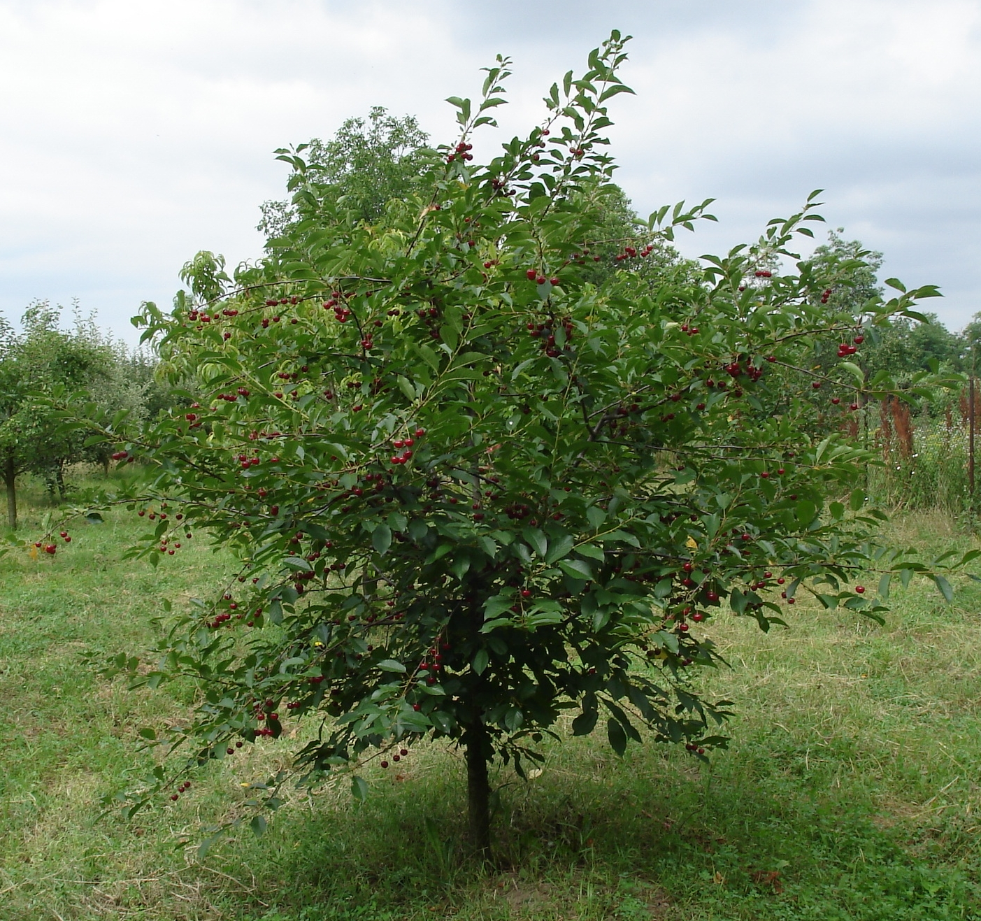 Prunus cerarus